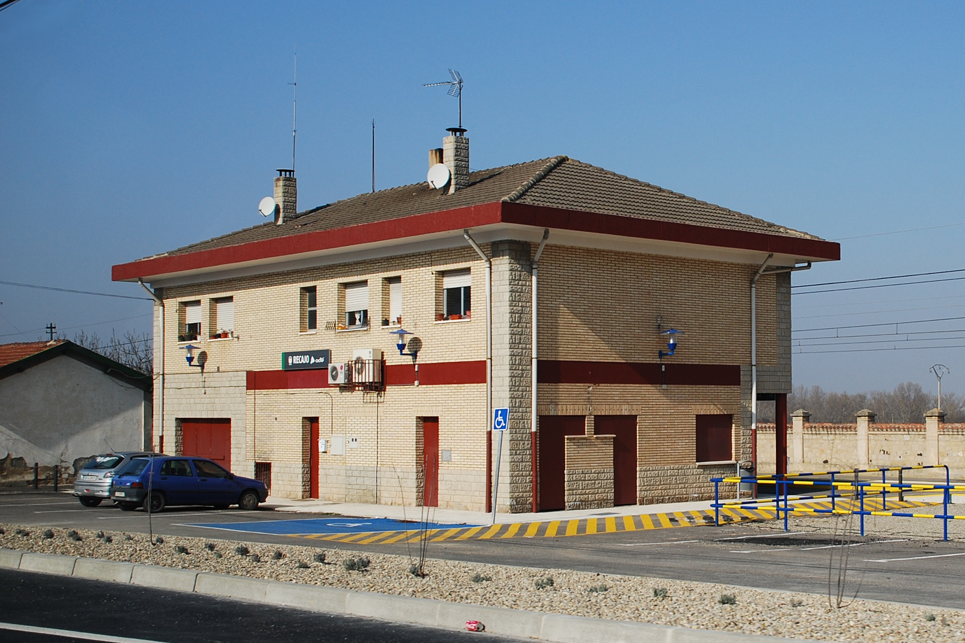 Estación de Recajo, en la localidad de Agoncillo, en La Rioja (España).